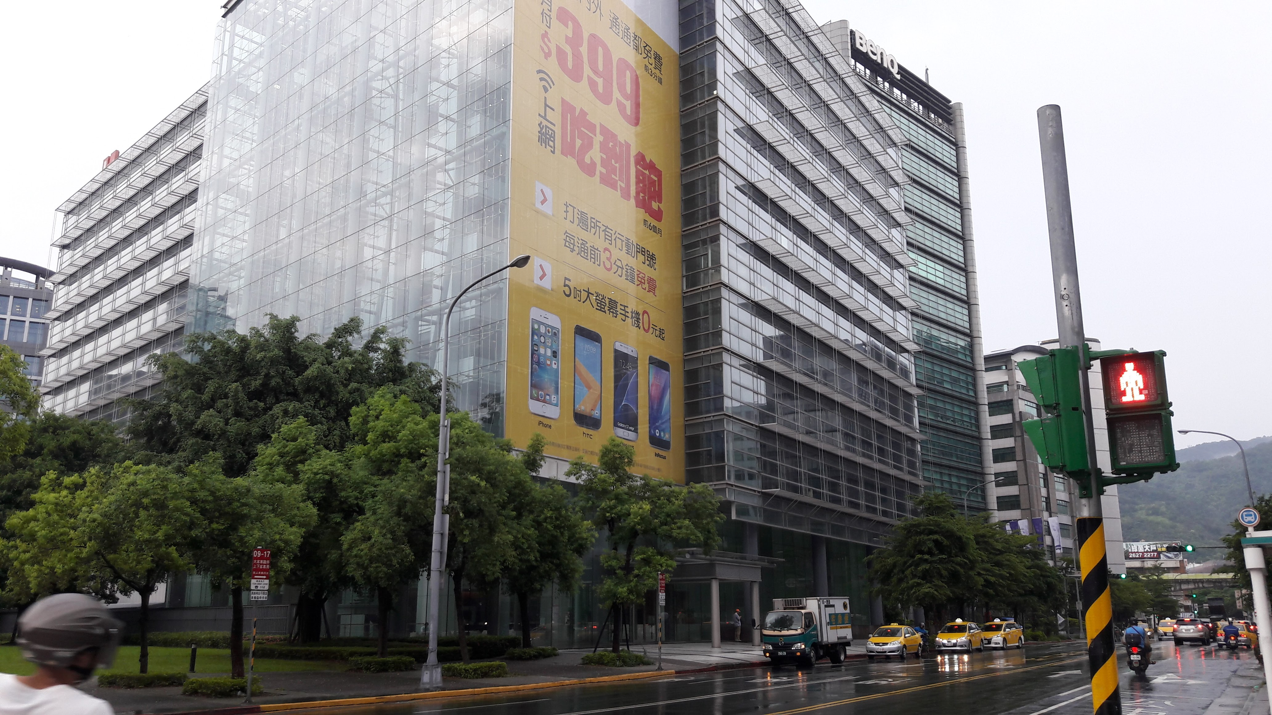 亞太電信總部位於臺北市內湖區基湖路32號8樓